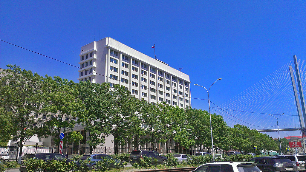 Здание штаба Краснознамённого Тихоокеанского флота ВМФ России. Владивосток, Корабельная набережная.